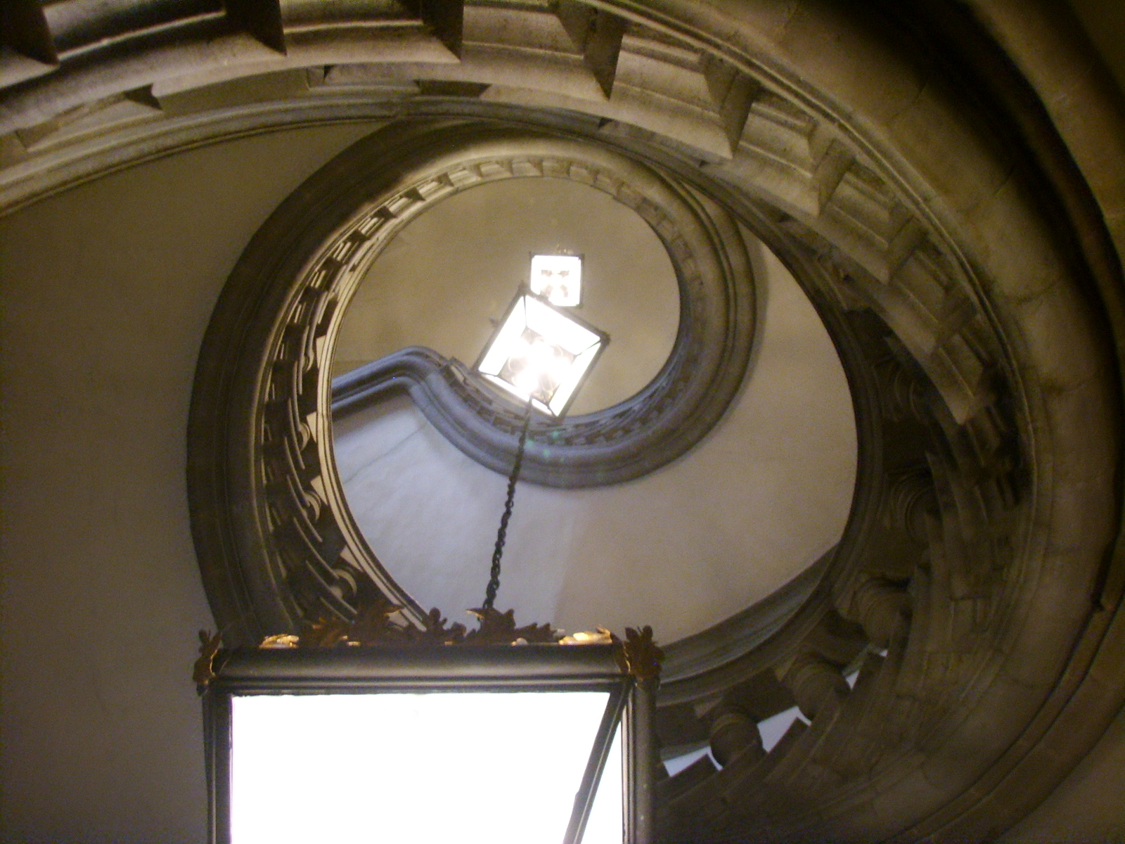 Palazzo corsini, scalinata elicoidale di Pierfrancesco Silvani